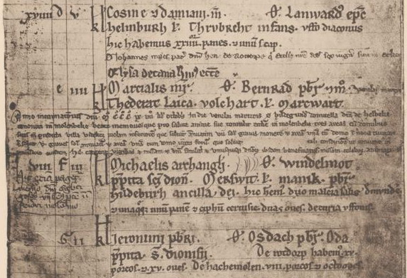 Ausschnitt aus dem Nekrolog des Klosters Möllenbeck. Zu sehen sind die Einträge für den 27. bis 30. September, u.a. Cosmas und Damian sowie Michaelis.